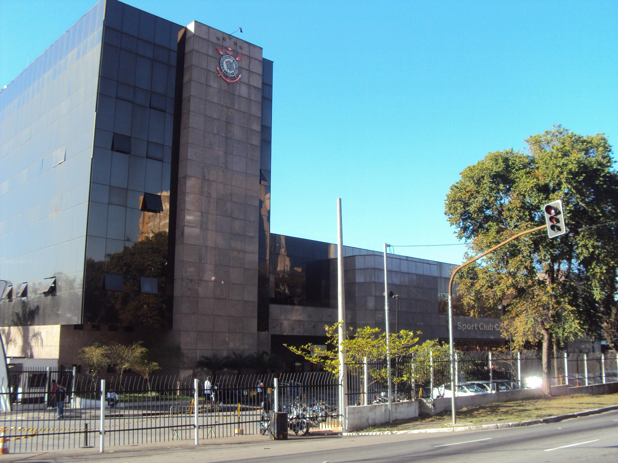 Sede social do Sport Club Corinthians Paulista, localizada no Parque São Jorge, cidade de São Paulo.